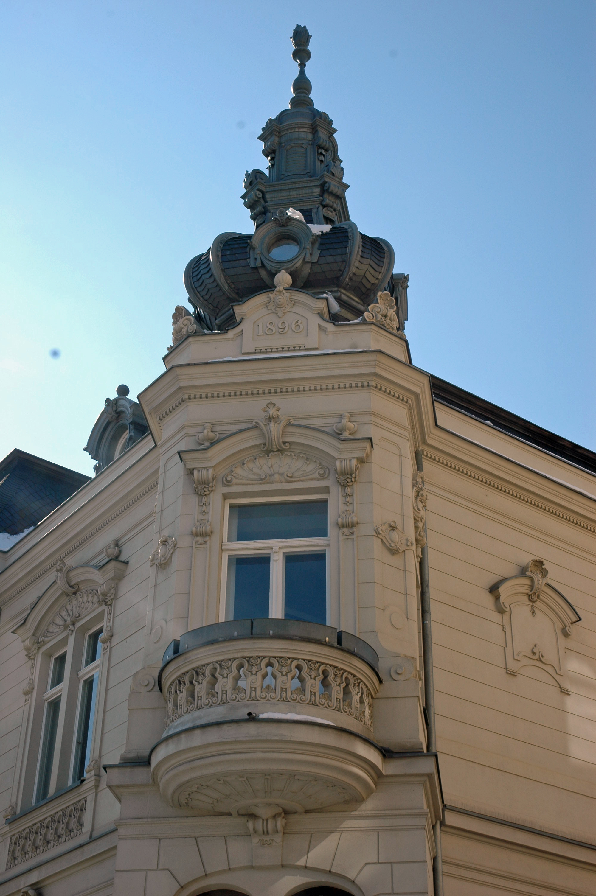 Bahnhofstraße 76, Ansicht 2